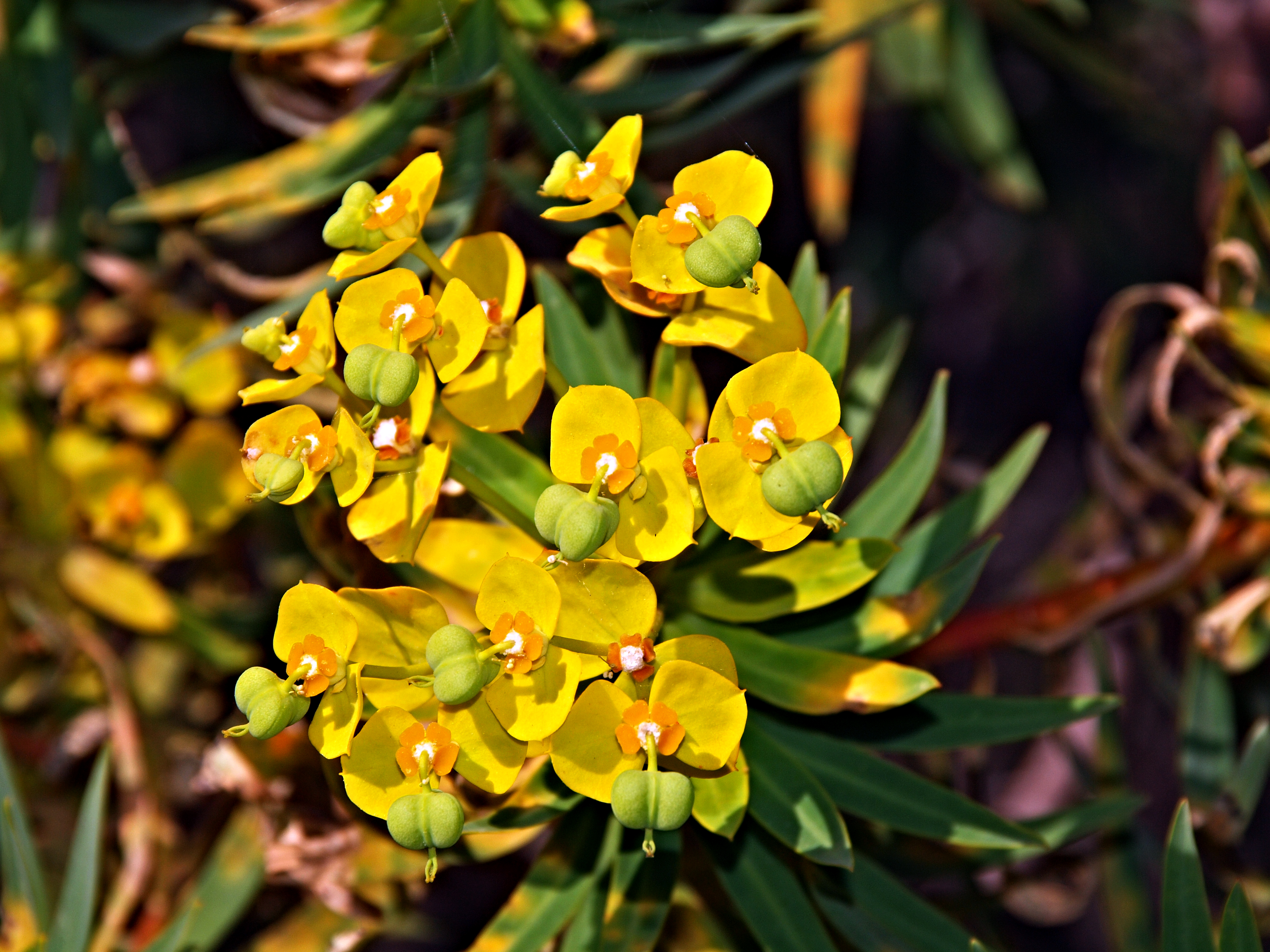 Ota Porto (Corse) - Euphorbe arborescent sur versant pierreux dominant la mer